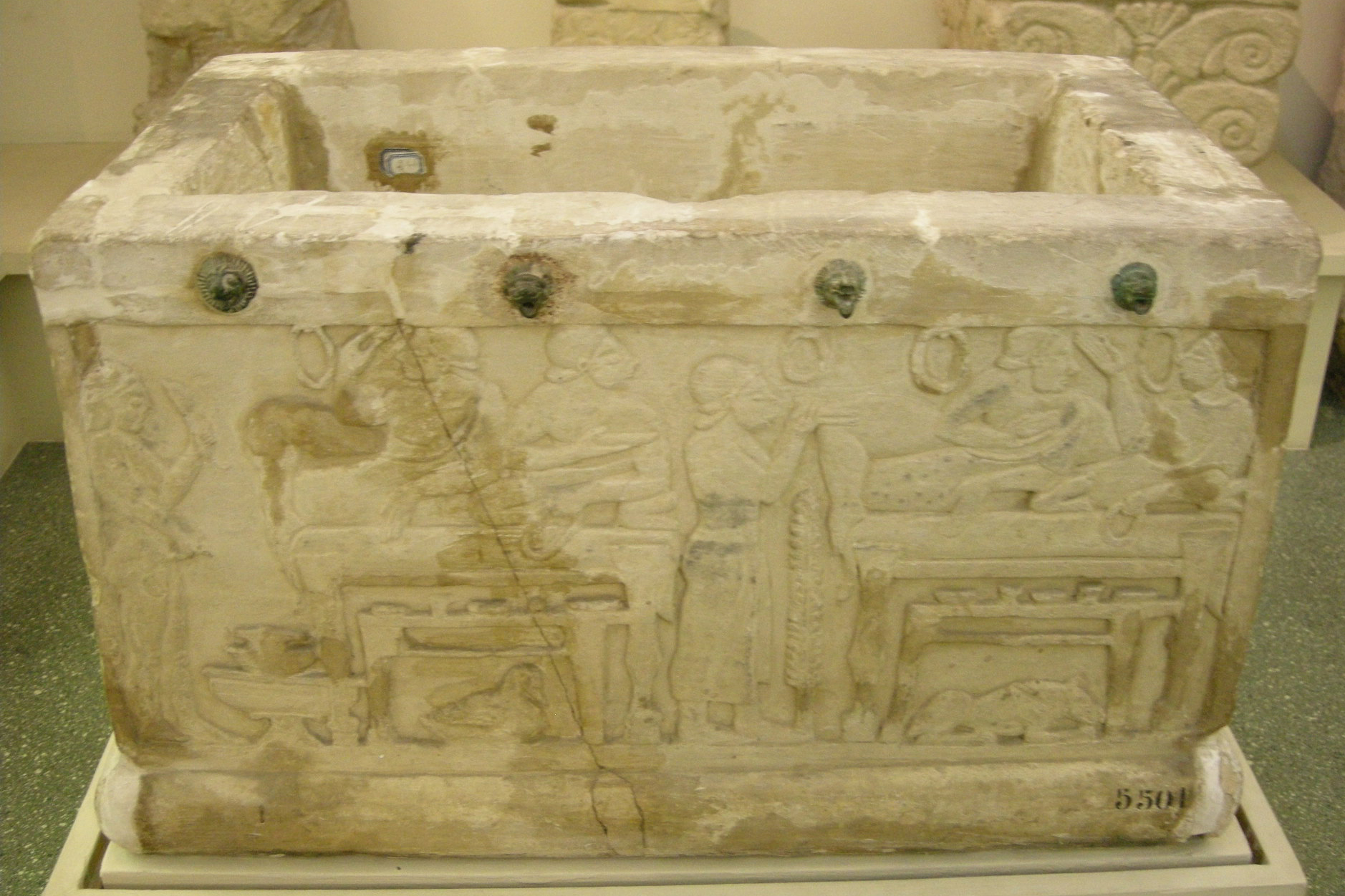 Urnetta cineraria da chiusi con scene di banchetto, 520 ac. circa